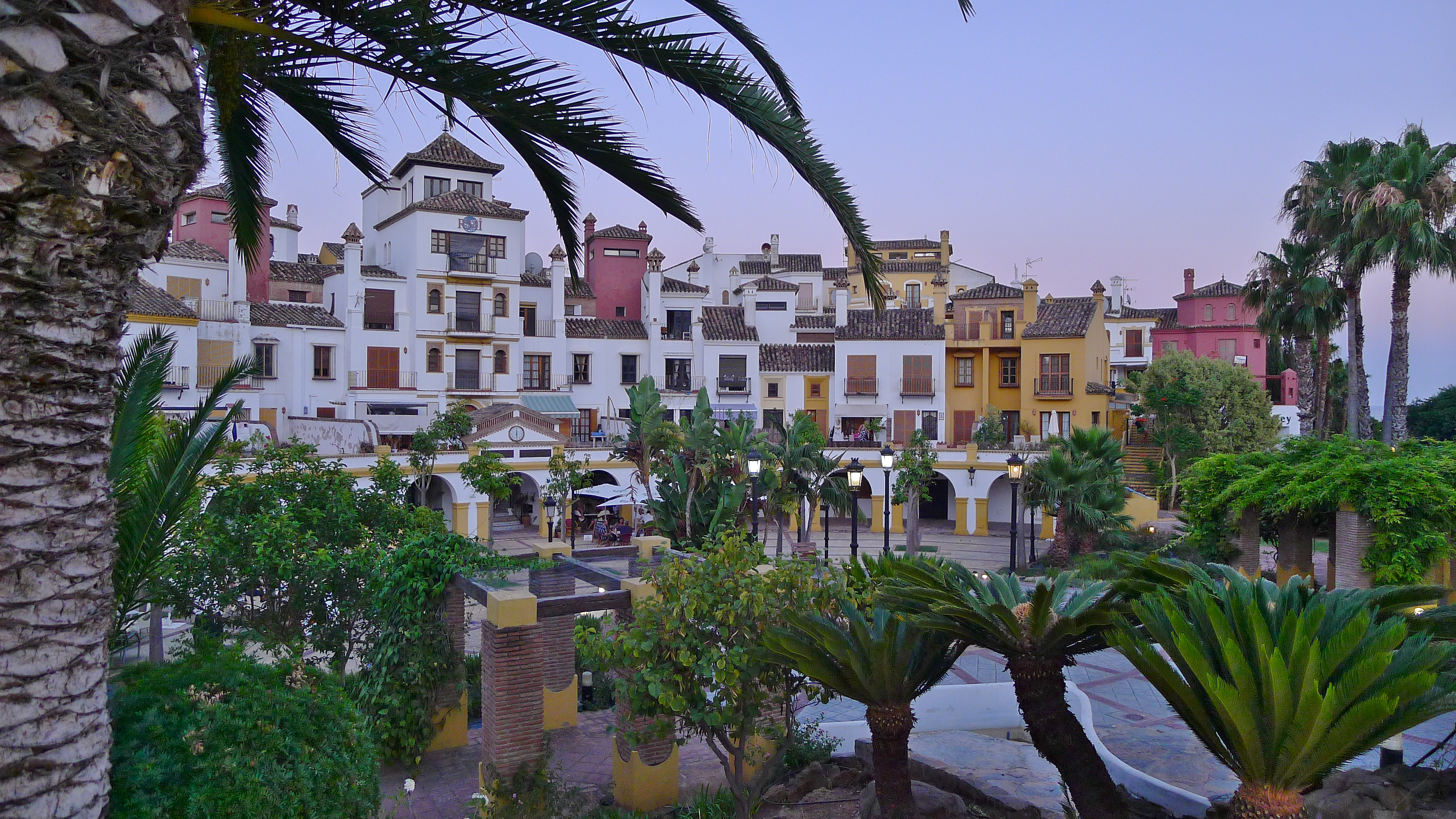 Urbanismo moderno con estilismos andaluces